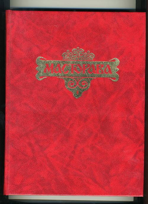 ""Масторава" морокерьксесь-книгась", "The book of the eposs "Масторава" (Mastorava)"